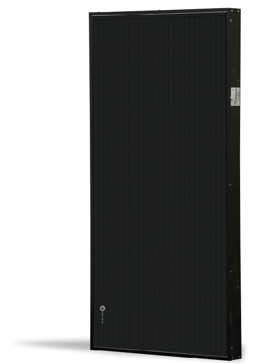 Sistema de Calefacción y Ventilación solar colocado en el frente de una vivienda